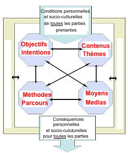 schéma du modèle